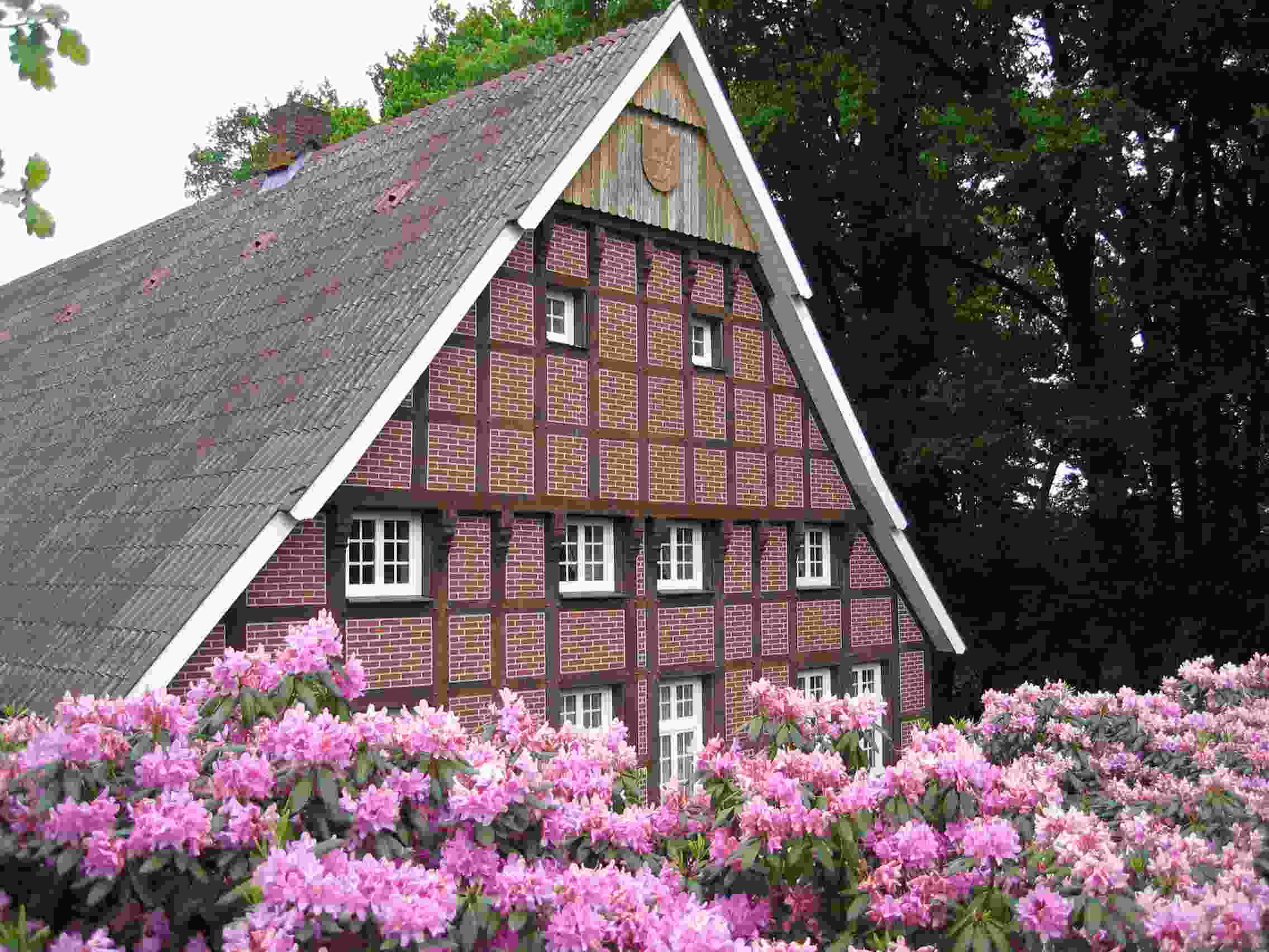 Niederdeutsches Hallenhaus in Büschel/Bakum